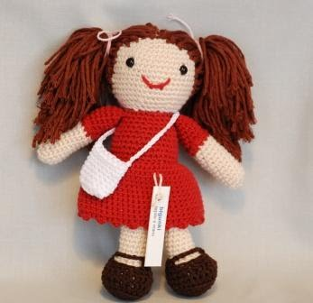 Muñeca Bigunki.2010. Técnica Amigurumi, ganchillo circular. Hecha a mano